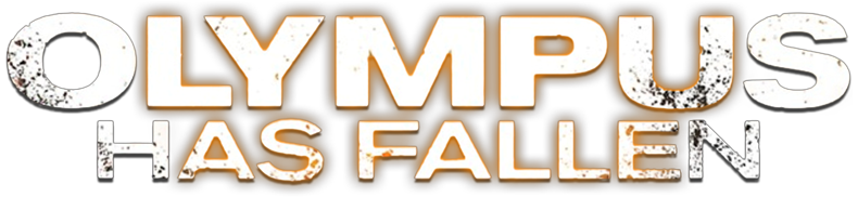 Olympus Has Fallen Logo